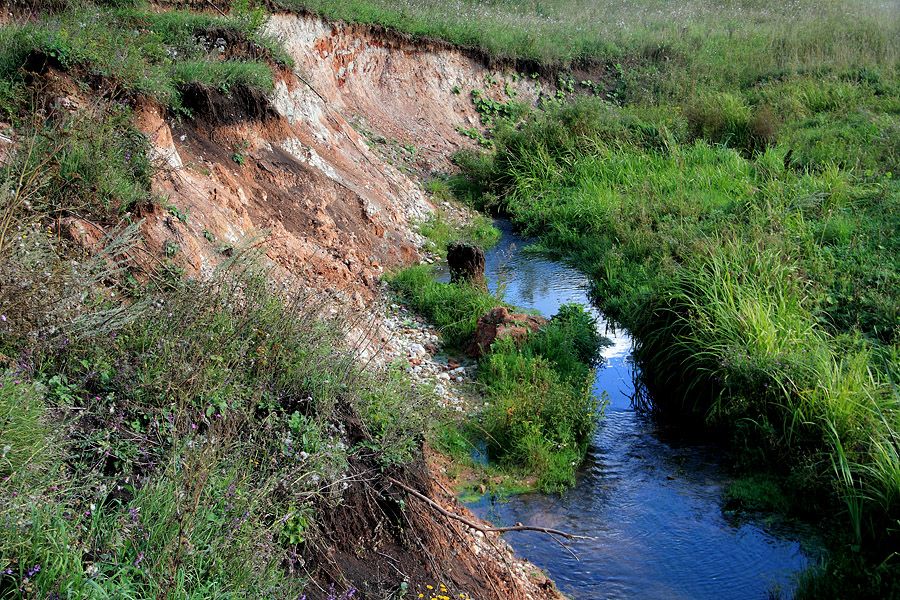 Склон Чарду: Располагается в 2,5 км западнее д. Еметкино и в 1 км севернее д. Бишево; кв. 23 Сотниковского (Тюрлеминского) участкового лесничества КУ «Мариинско-Посадское лесничество»,Козловский район, This image is related to the protected area of Russia number 2110075